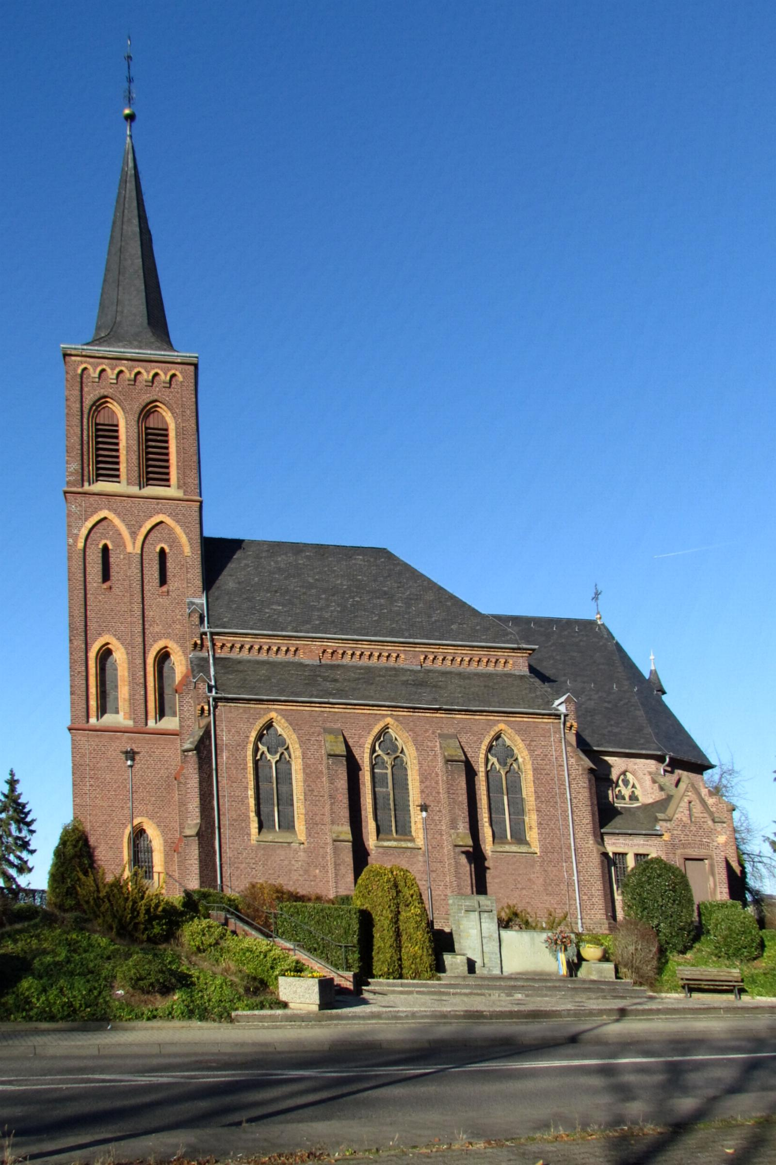 Pfarrkirche in Süggerath